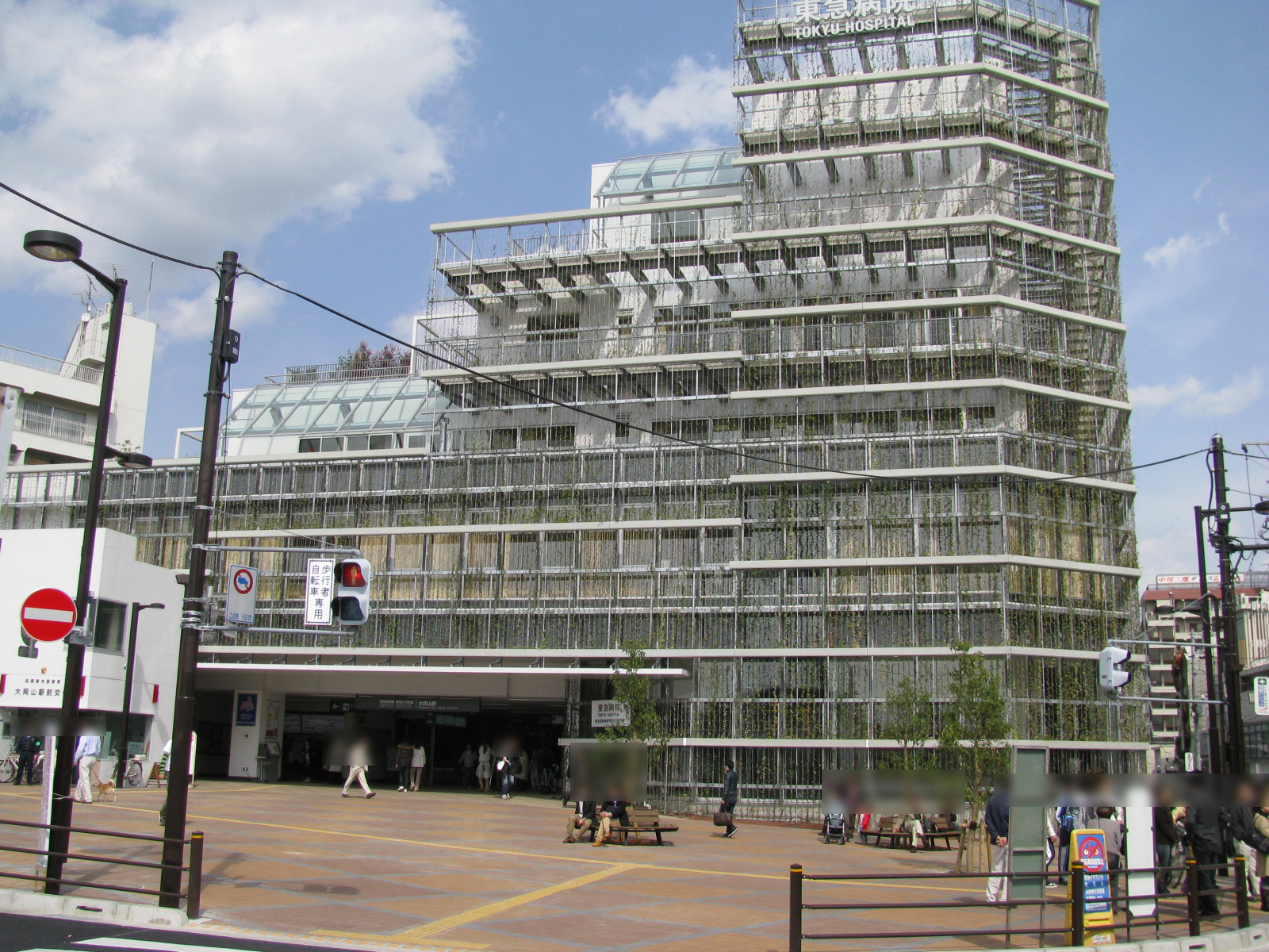 東急目黒線、東急大井町線大岡山駅